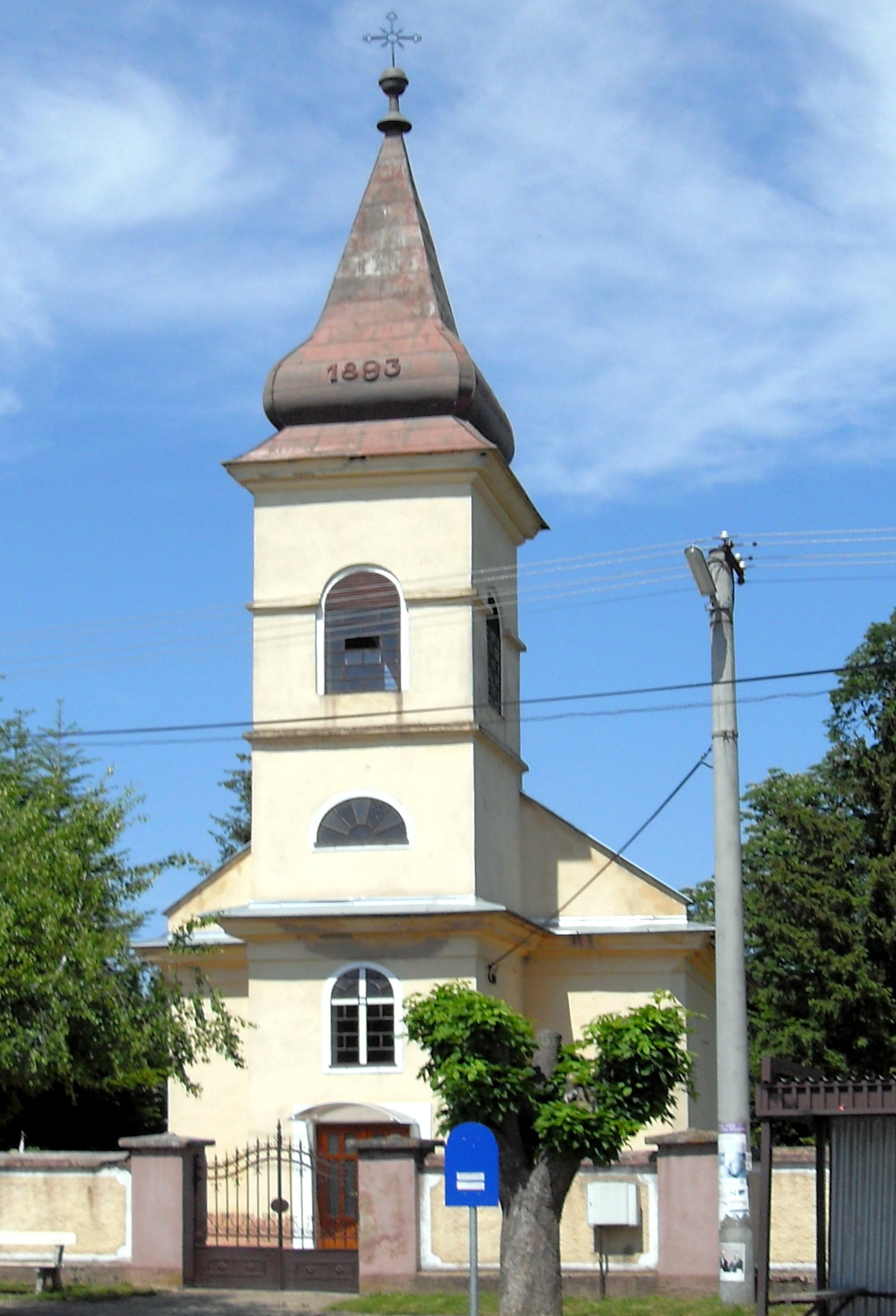 Nižný Lánec, Rímskokatolícky Kostol svätých Petra a Pavla